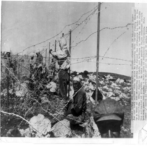 המאורעות בארץ ישראל, 1938 - גבול סורי לבנוני עבודות תיקון "חומת טגארט"